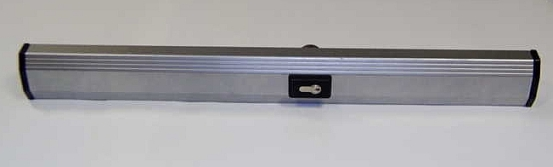 Querriegelschloss , Germany.